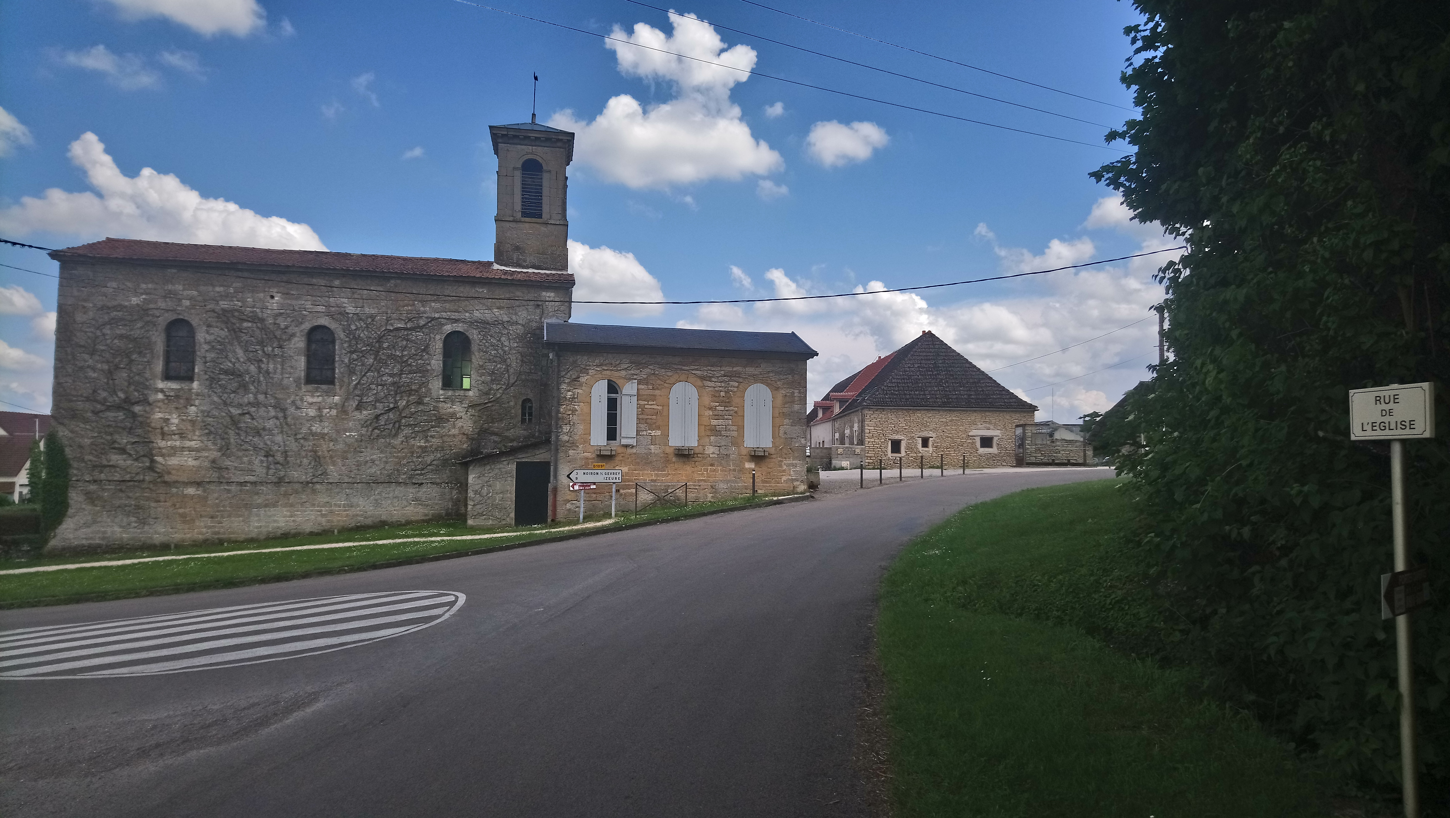 Rue de l'Eglise, au carrefour de la rue du Cerisier